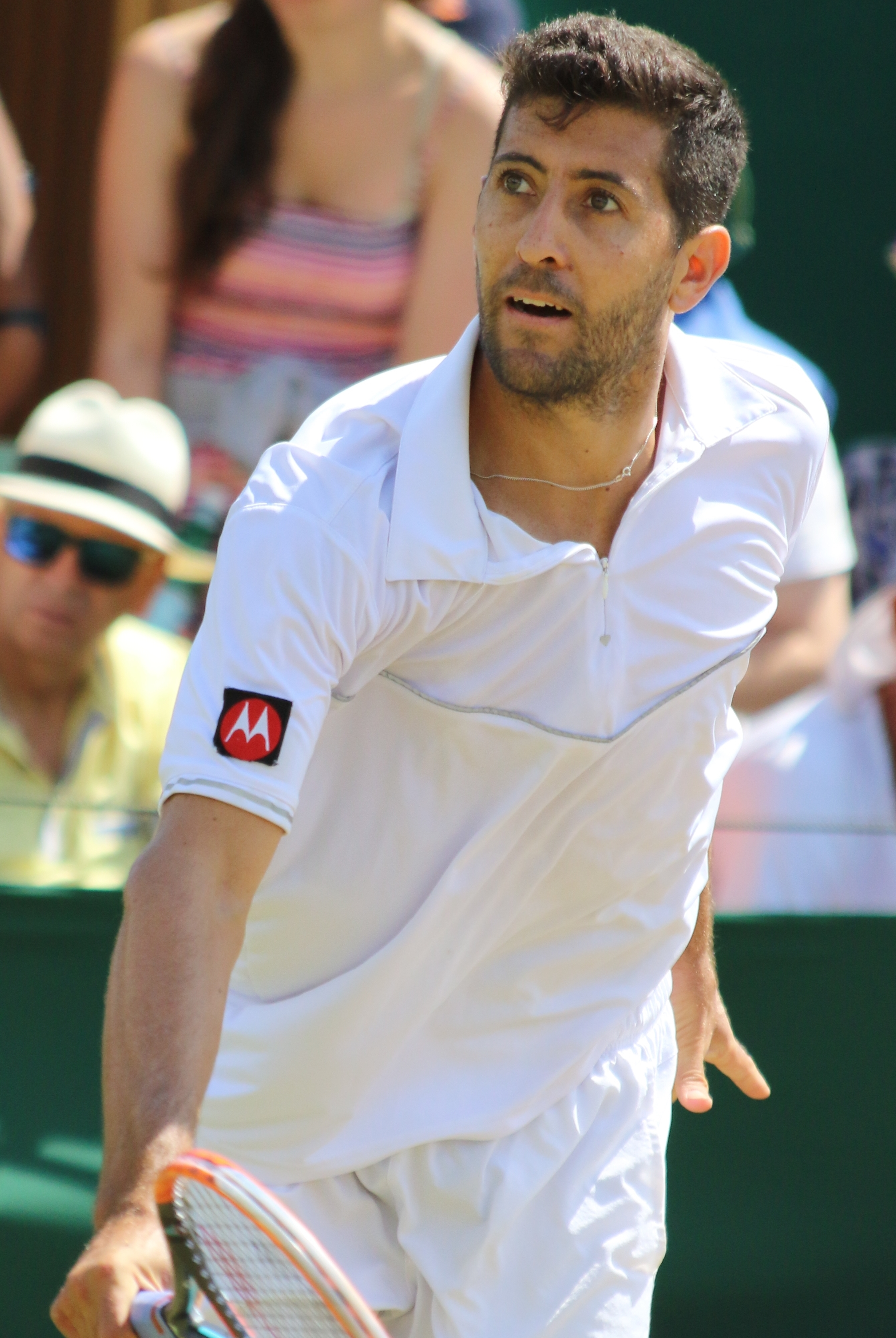 Podlipnik Castillo WM17 (1)